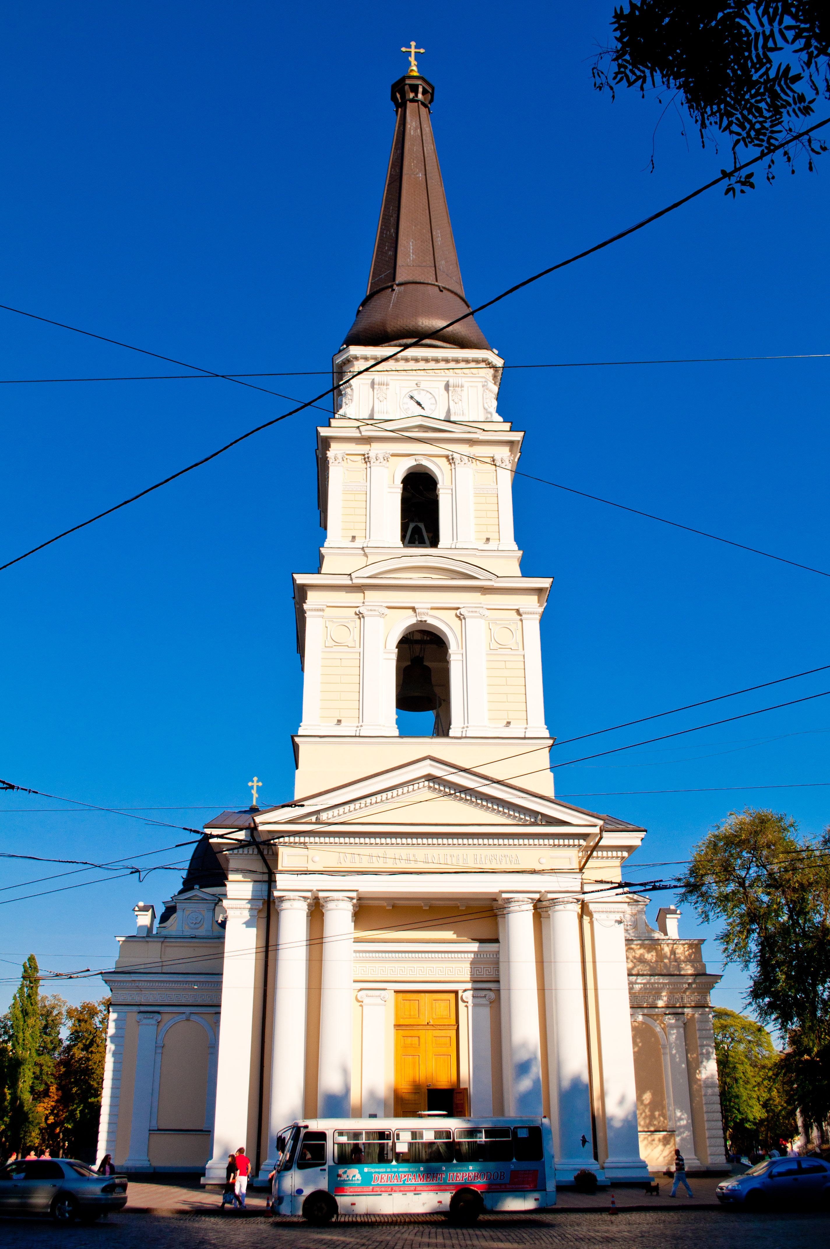 Будівля Спасо-Преображенського собору, де поховано видатних людей м. Одеси й Південного регіону України – князя М.С. Воронцова та княгиню Є.К. Воронцову